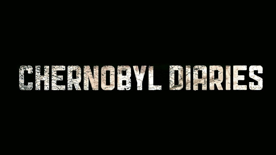 Logotipo de la película Chernobyl Diaries, producida en 2012 por Alcon Entertainment, FilmNation Entertainment y Oren Peli/Brian Witten Pictures. Póster y logotipo diseñados por Art Machine.